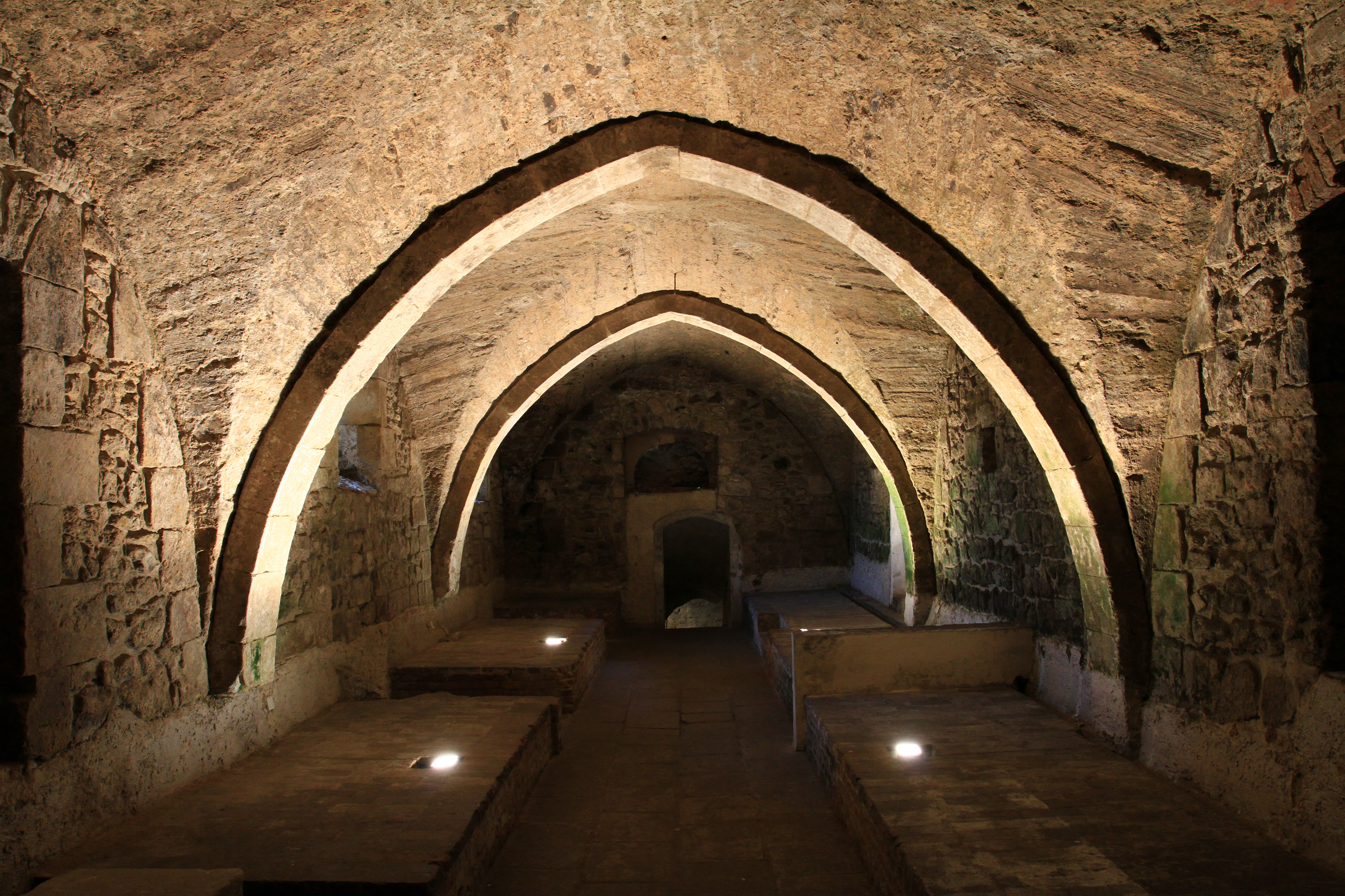 Zámek Český Dub, Starý zámek 1, Český Dub